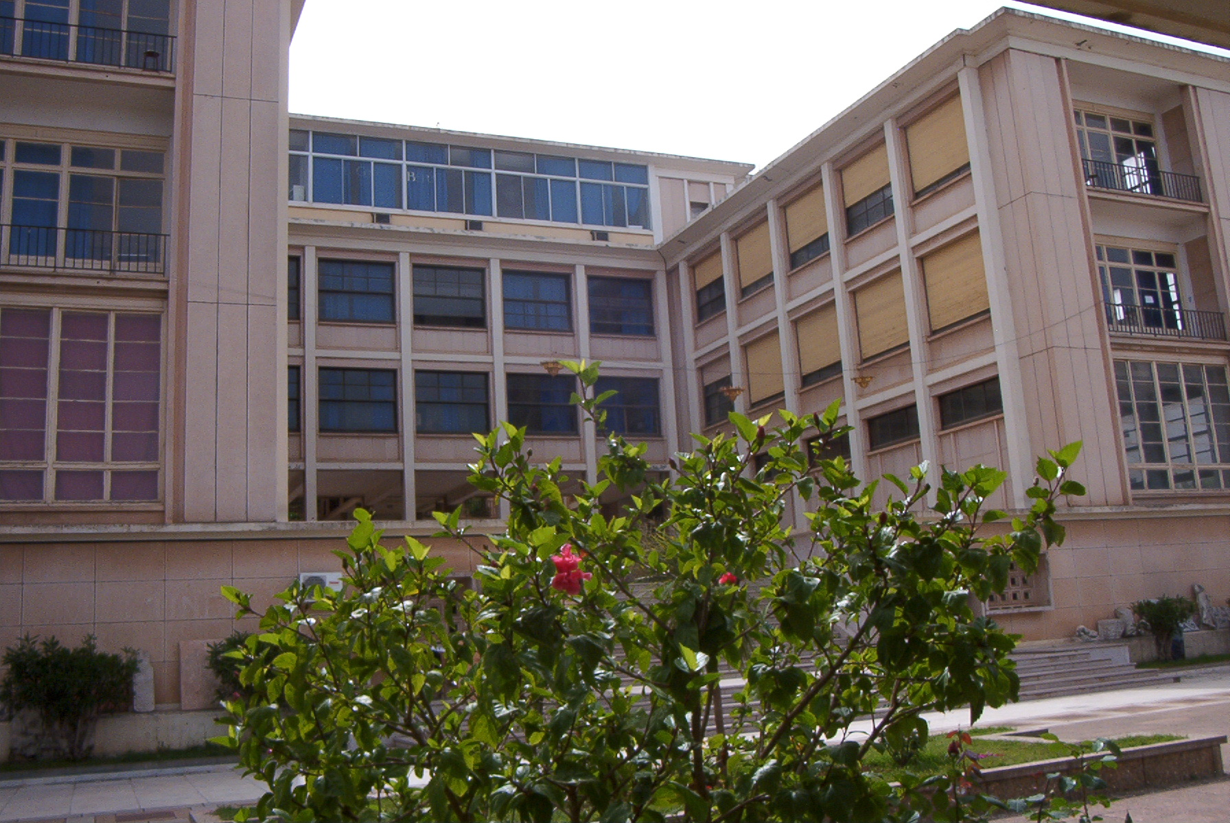 Ecole des Beaux-Arts d'Alger